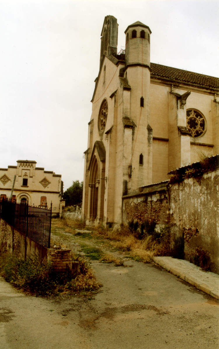 can-bros1